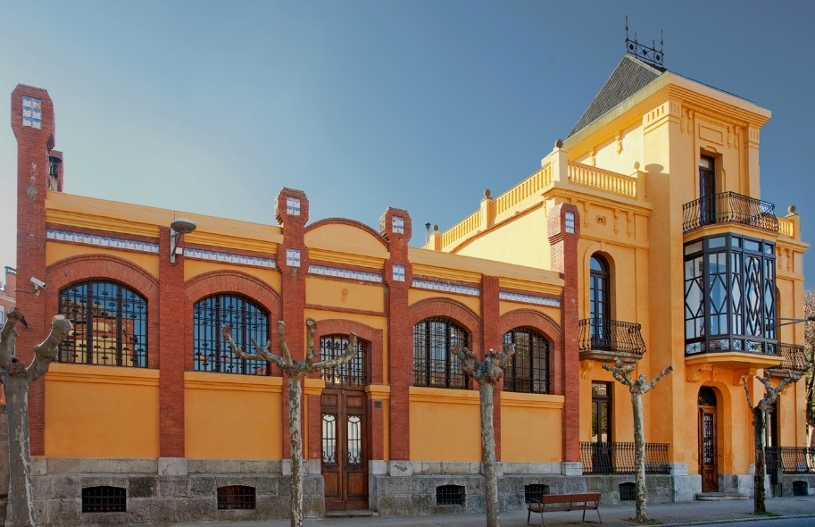 Sede del Museo del Chocolate de Astorga (León)